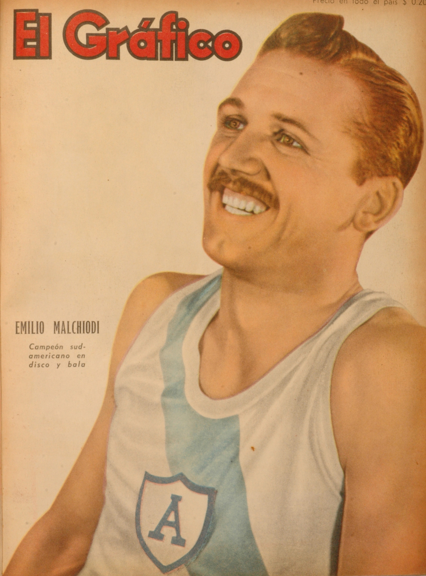 El Grafico del 18 de Mayo de 1945. Edicion 1349